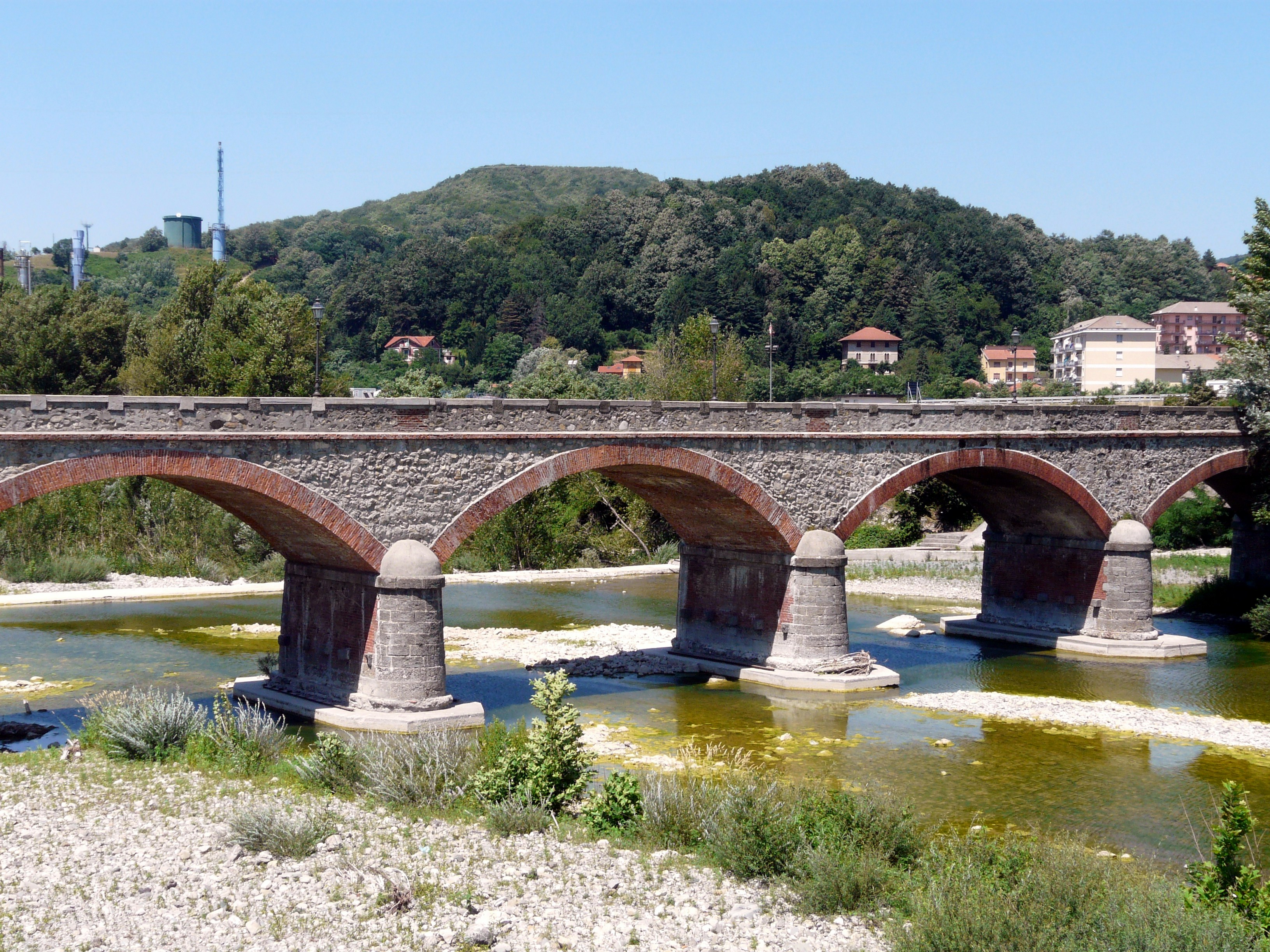 Ponte vecchio presso lo Scrivia, Busalla, Liguria, Italia